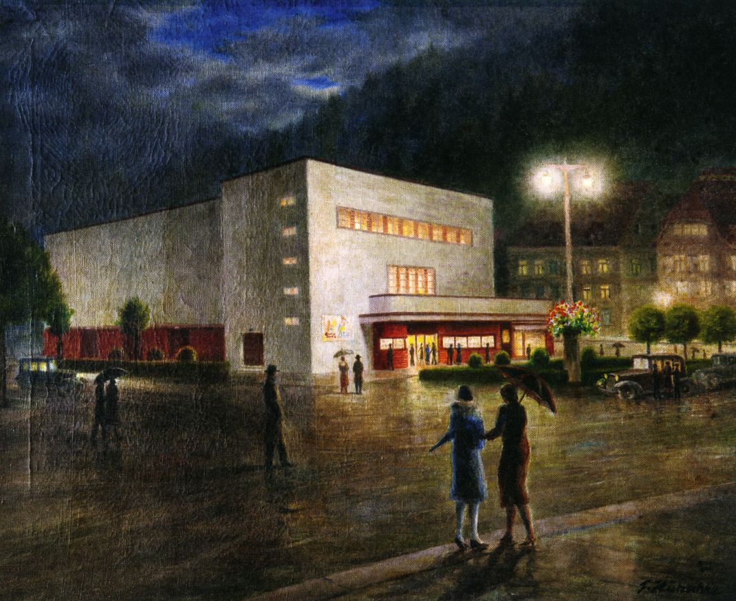 Lichtspielhaus Schramberg, Gemälde von Franz Hützschke Museum zur Geschichte von Christen und Juden in Laupheim